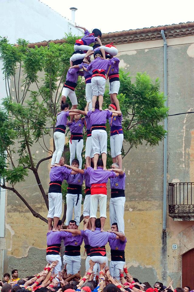 5d7 descarregat al concur7 l'any 2014